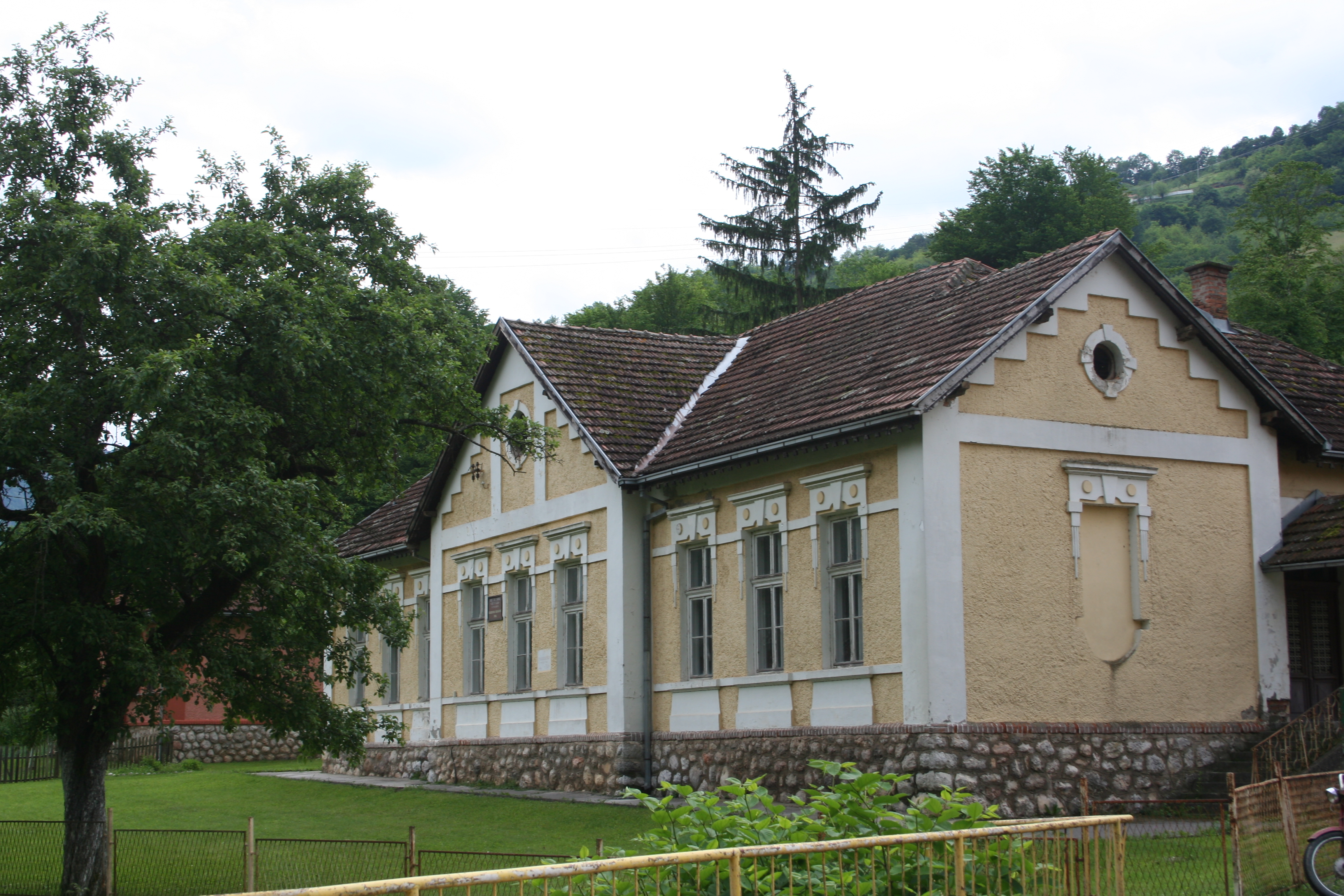 Centar sela i škola u Rači, Bajina Bašta